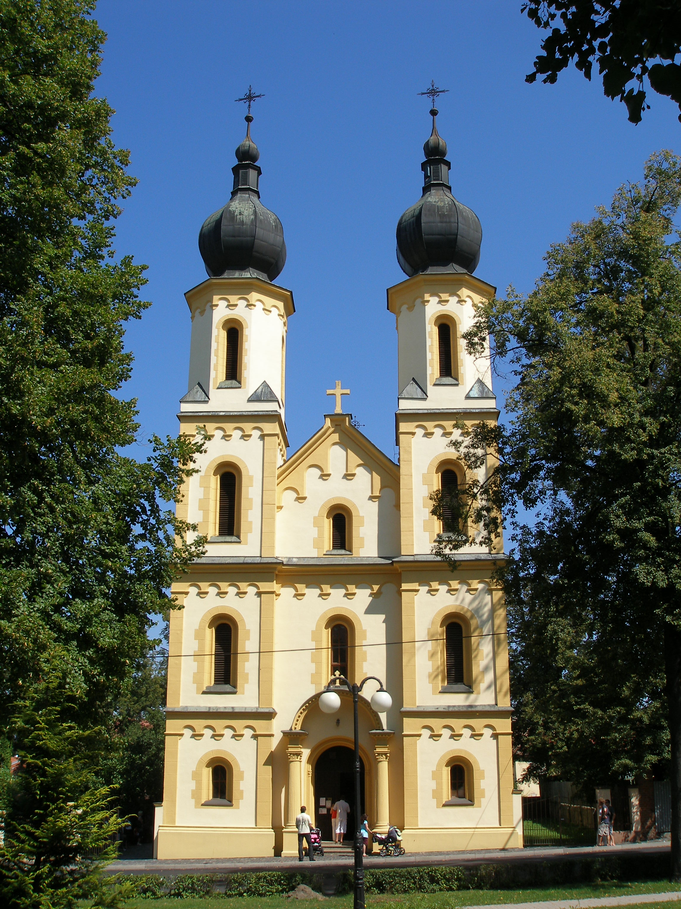 Kostol svätých Petra a Pavla je gréckokatolícky chrám s novorománskymi prvkami na fasáde. Postavený bol v južnej časti bývalej hradobnej priekopy (dnes Jiráskova ulica) v rokoch 1901 - 1902. Má pozdĺžny jednoloďový tvar s polygonálnym presbytériom, zaklenutý je pruskými klenbami. Hlavný oltár je z roku 1903 a ikonostas z roku 1914.